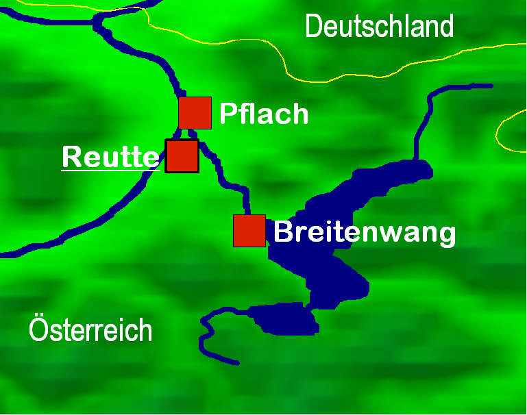 Zusehen ist der Fluss Archbach in Österreich